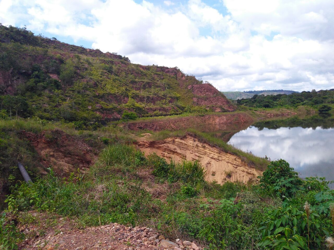 Vista parcial do lago da cava em Serra Pelada